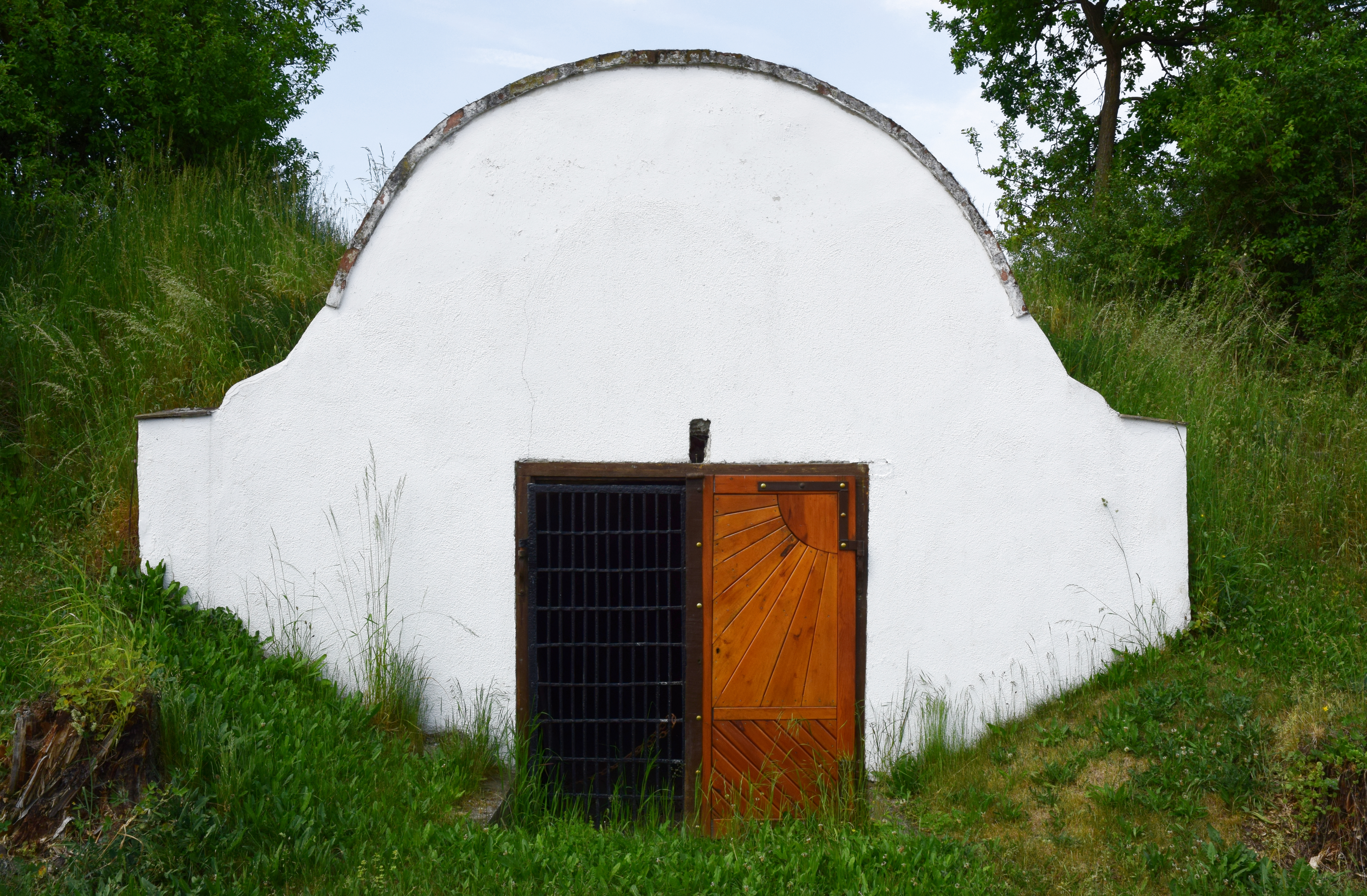 Objekt in der Kellergasse „Kellerweg“ in der KG Mold in Rosenburg-Mold